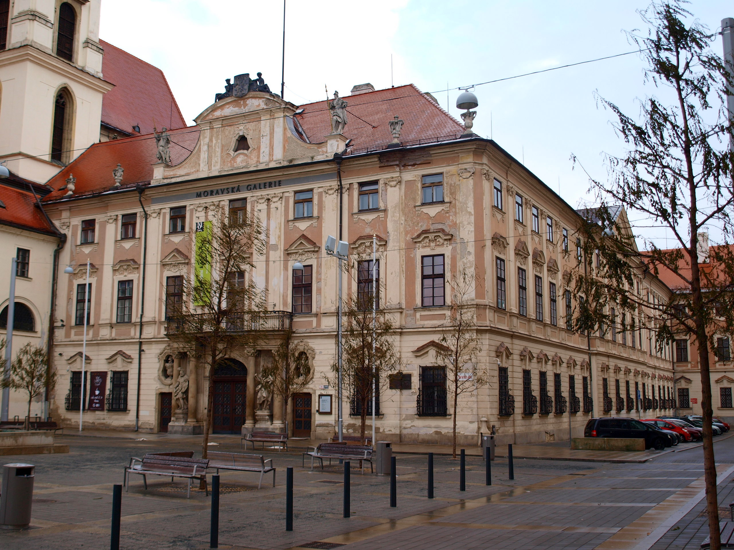 Místodržitelský palác, Brno